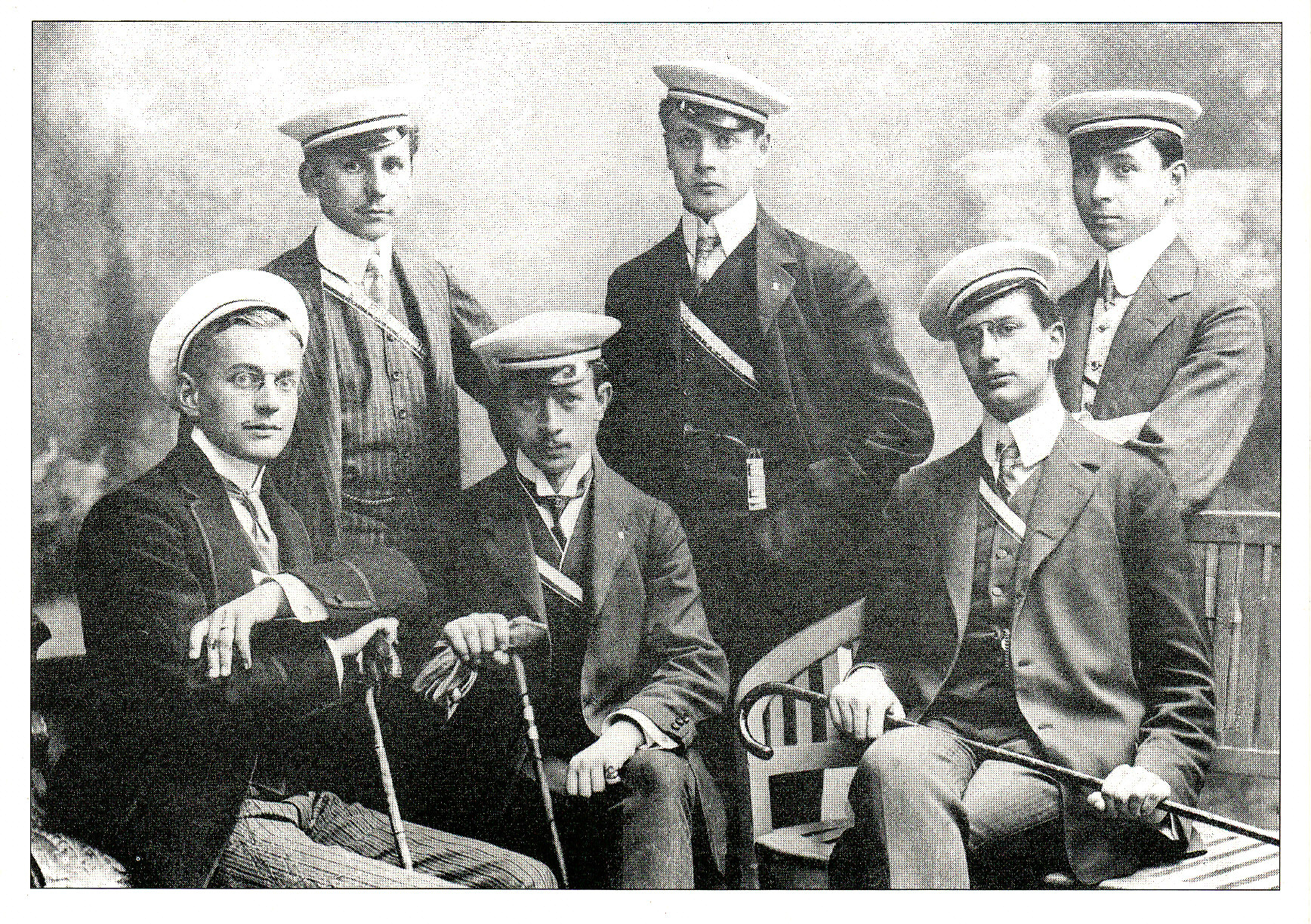 6 Gründungsburschen Marco-Danubiae (um 1909) v.l.n.r hinten: Edlinger, Schatzmann, Weinmeister vorne: Schober, Perntner, v. Lederer